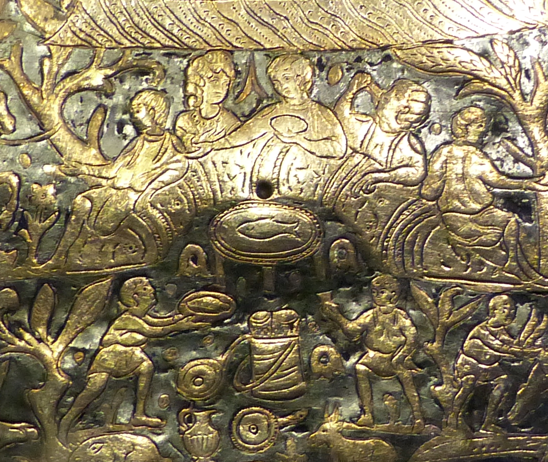 Vadásztál. Seuso kincs. A felvétel 2017. július 17-én, hétfőn készült az Országházban. Lapos ezüsttál, átmérője 70,5 cm, tömege 8,8 kg. A tál közepén vadászati jelenetekkel közrefogott szabadtéri lakomajelenet. Kör alakú mezőbe foglalt díszítését latin nyelvű verses felirat keretezi. Seuso a kincs tulajdonosa lehetett aki jelentős családi esemény, talán mennyegző alkalmával kaphatta ajándékba ezt a tárgyat. A vadásztársaság a halban gazdag Balaton partján lakomázik. A víz felett Pelso (Balaton). A tál a 4. század közepe táján készülhetett. Seuso, Pannonia helytartója birtokának széle a legközelebbi Balatonpart a Partfő, Balatonkenesén.